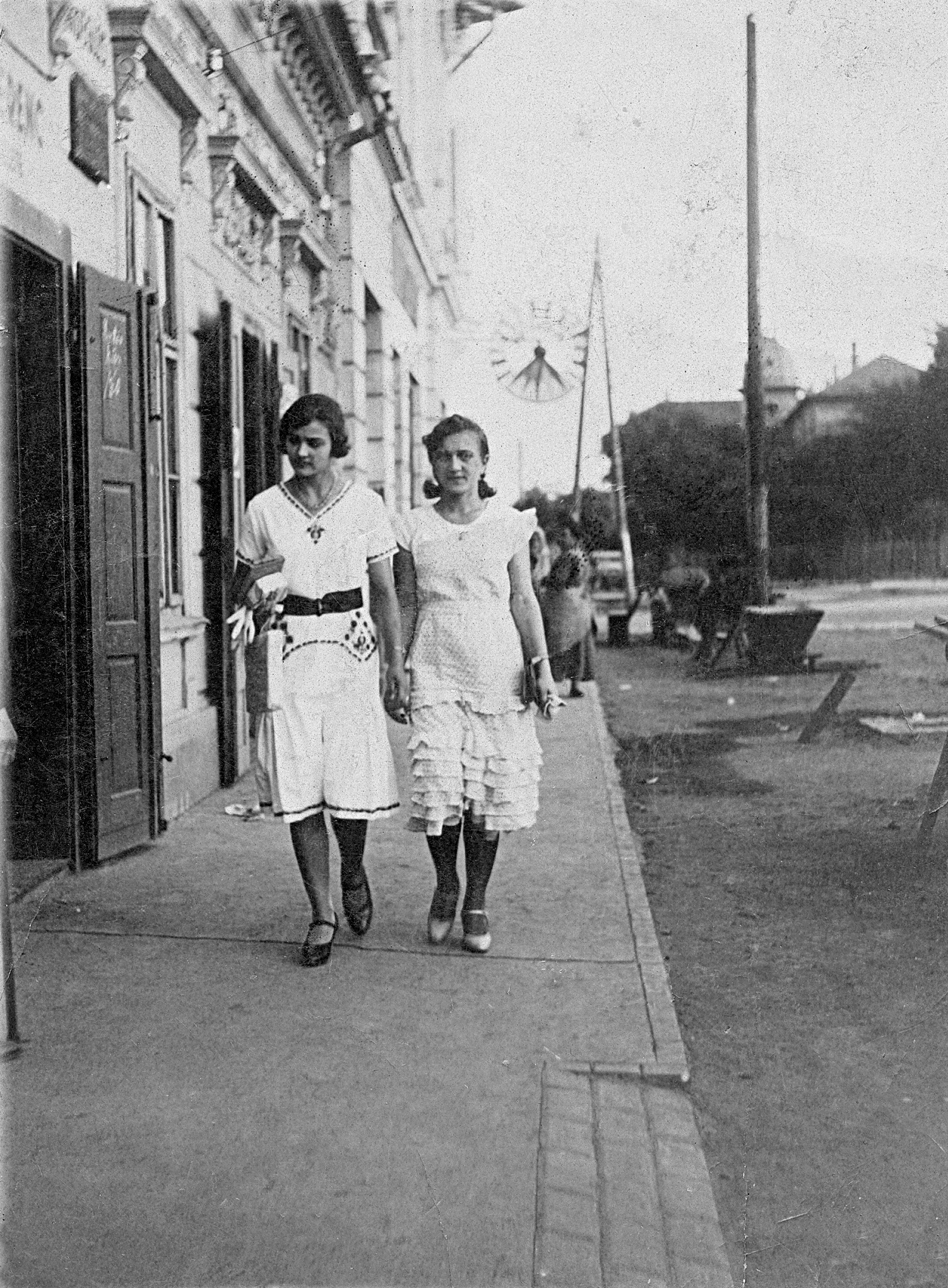 Hunyadi tér, balra a Schmidt-kocsma, mögötte a Rothermel ház. Location: Hungary, Dombóvár Tags: fashion Title: Hunyadi tér, balra a Schmidt-kocsma, mögötte a Rothermel ház.